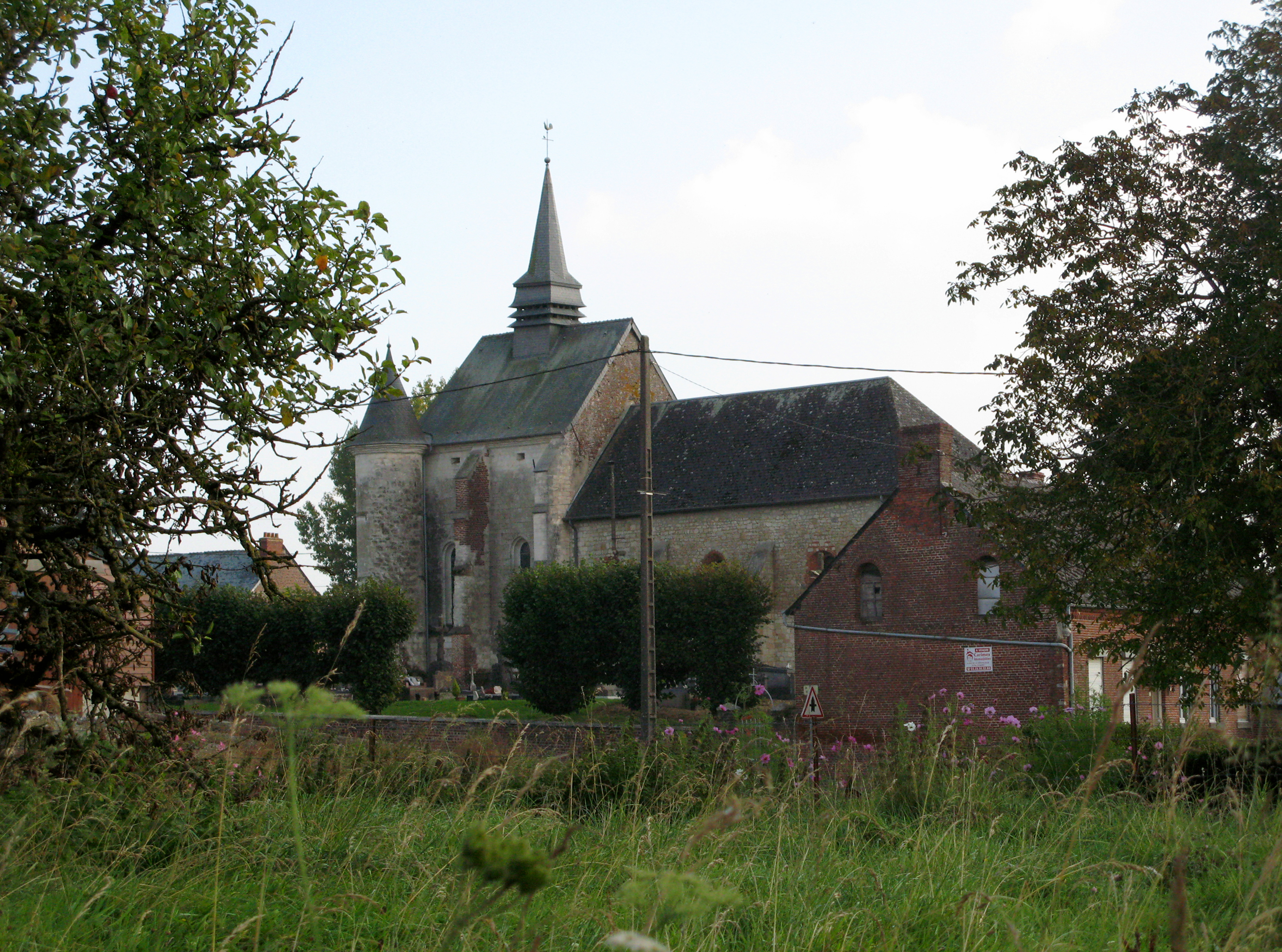 Renneval (Aisne, France) - L'église Notre-Dame. Photo prise depuis le haut du talus (et la clôture qui délimite la pâture) surplombant la rue. La vue sous cet angle a priori peu "photogénique" de l'église fortifiée, en arrivant dans le village par le Nord - depuis l'angle de la route de Dagny-Lambercy (D 611) et celle de Vigneux-Hocquet (D 110) - permet d'imaginer encore un peu le paysage de bocage verdoyant dont la structure par talus et haies entourant l'édifice contribuait à sa défense. On remarque l'une des 2 tourelles d'angle du choeur dont la partie supérieure est occupée, à l'étage, par la "chambre fortifiée" dont on aperçoit 2 meurtrières sur cette face. . .